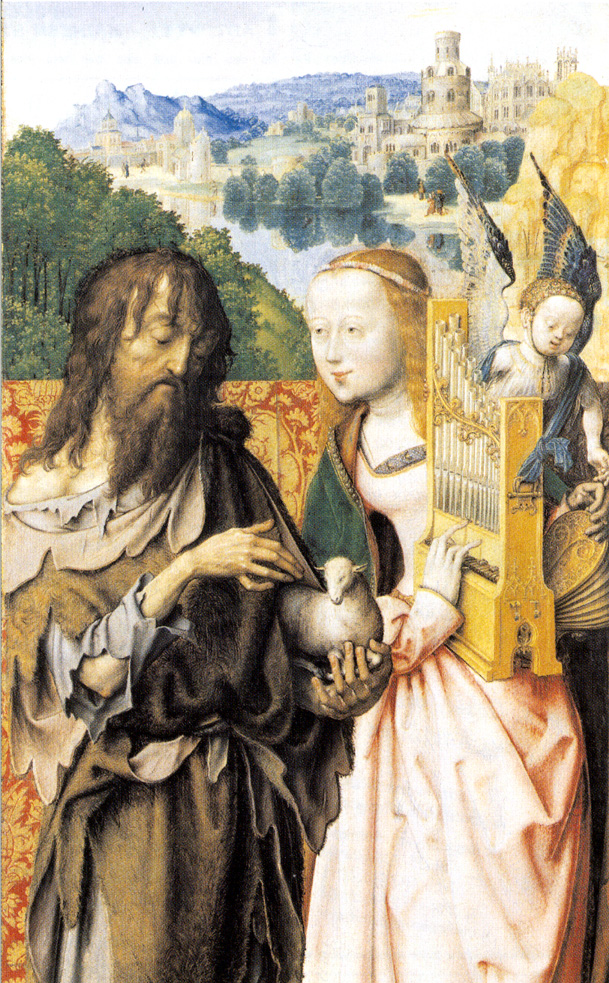 detail